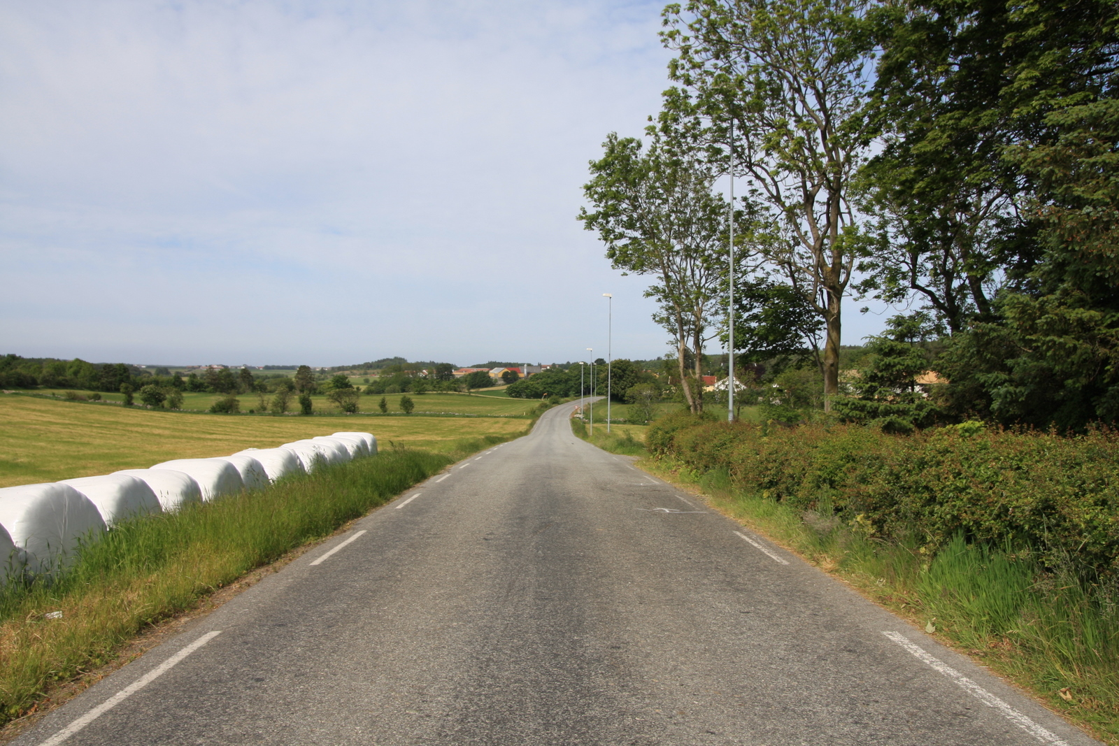 Fylkesvei 242 Stangelandsveien